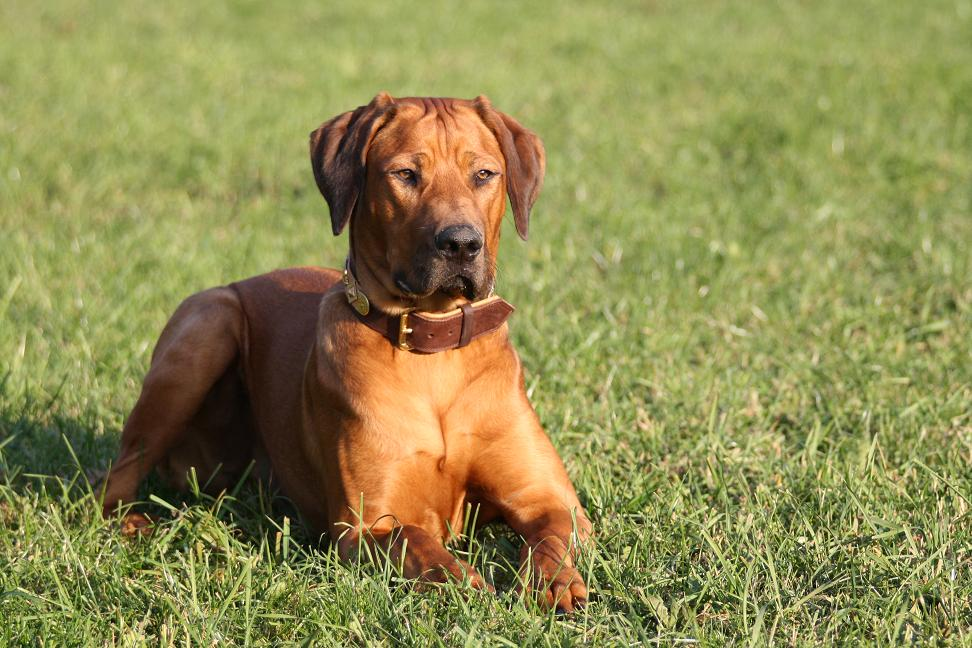 Rhodesian Ridgeback